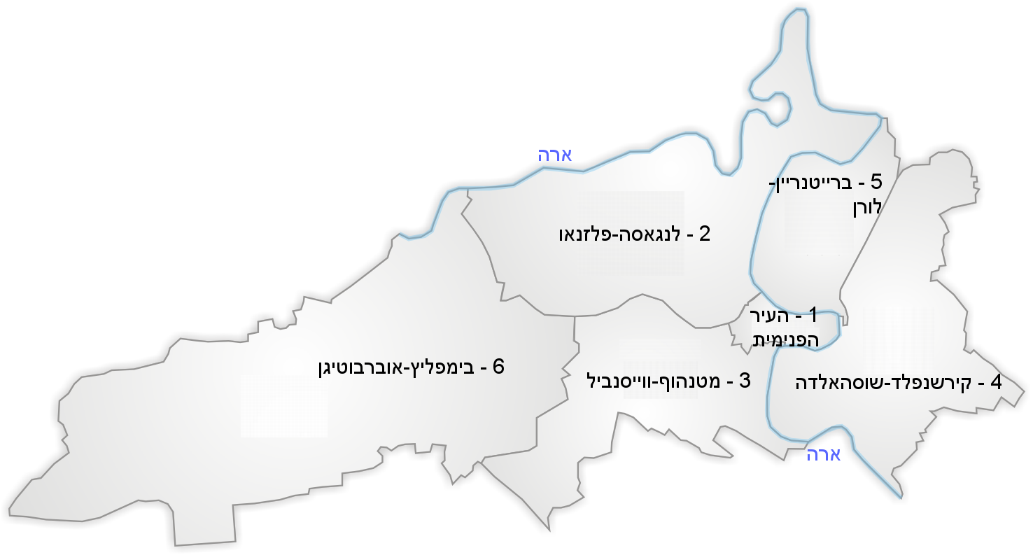 Karta Berzno